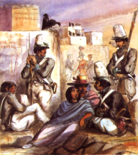 Militares peruanos de la guerra civil de 1843.